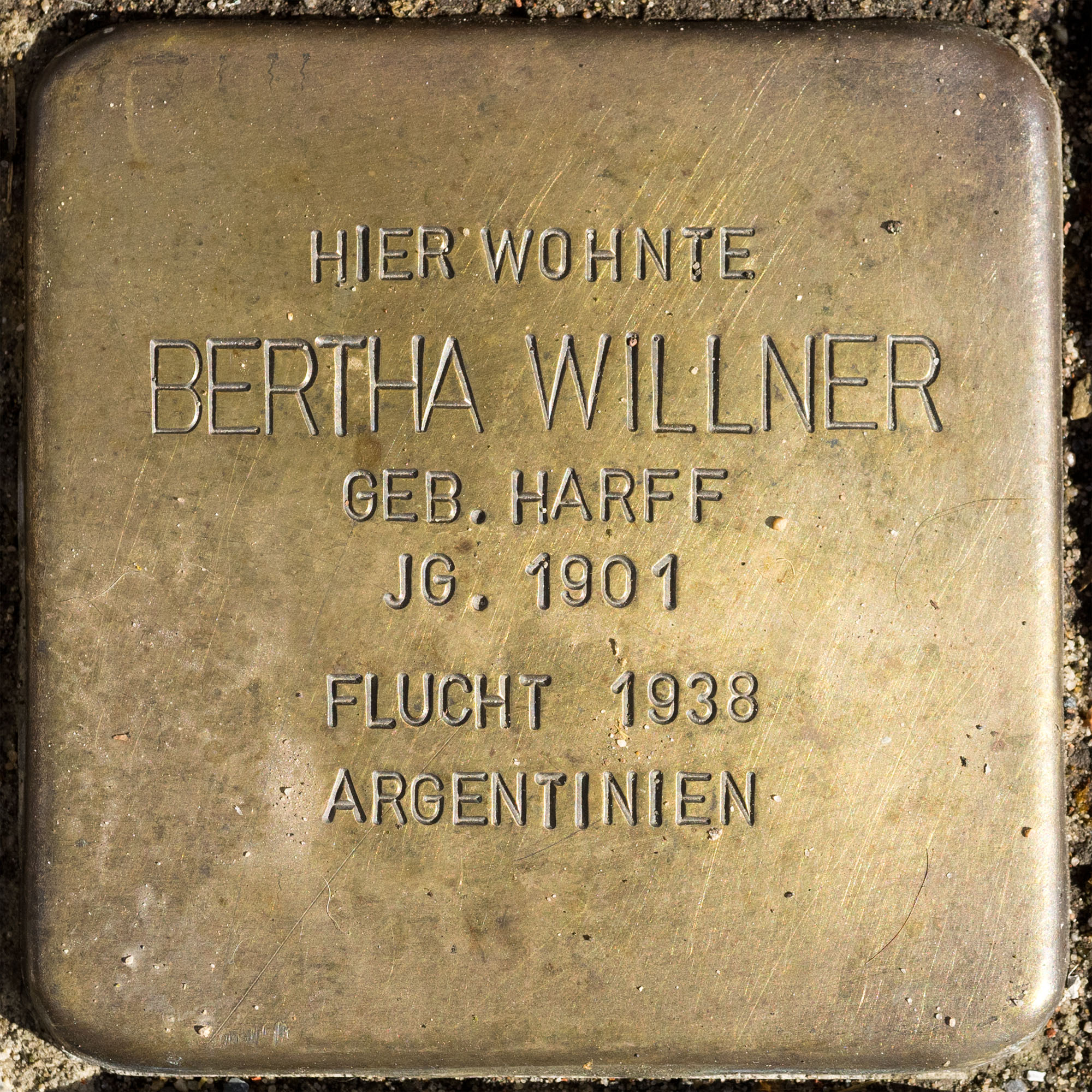 2016 Stolpersteine ToeVo Willner Bertha